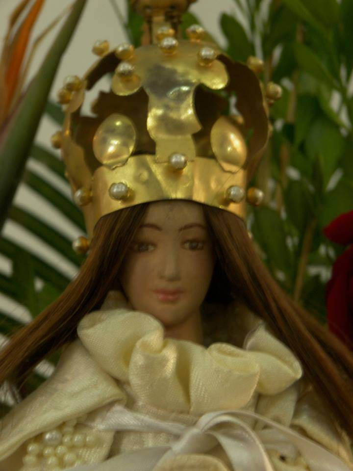 Advocación de la Santísima Virgen Maria, venerada en la Comunidad de Barcelona (Municipio Simon Bolivar, Estado Anzoategui, Venezuela), esta imagen fue encontrada a fines del siglo XVI, en las cercanias de la antigua ciudad de San Cristobal de la Nueva Ecija de los Cumanagotos, en el tronco hueco de un arbol de totumo o tapara (crescencia cujete), de ahi deriva el nombre con que fue conocida desde entonces, la Virgen del Totumo o Virgen del Totumito.